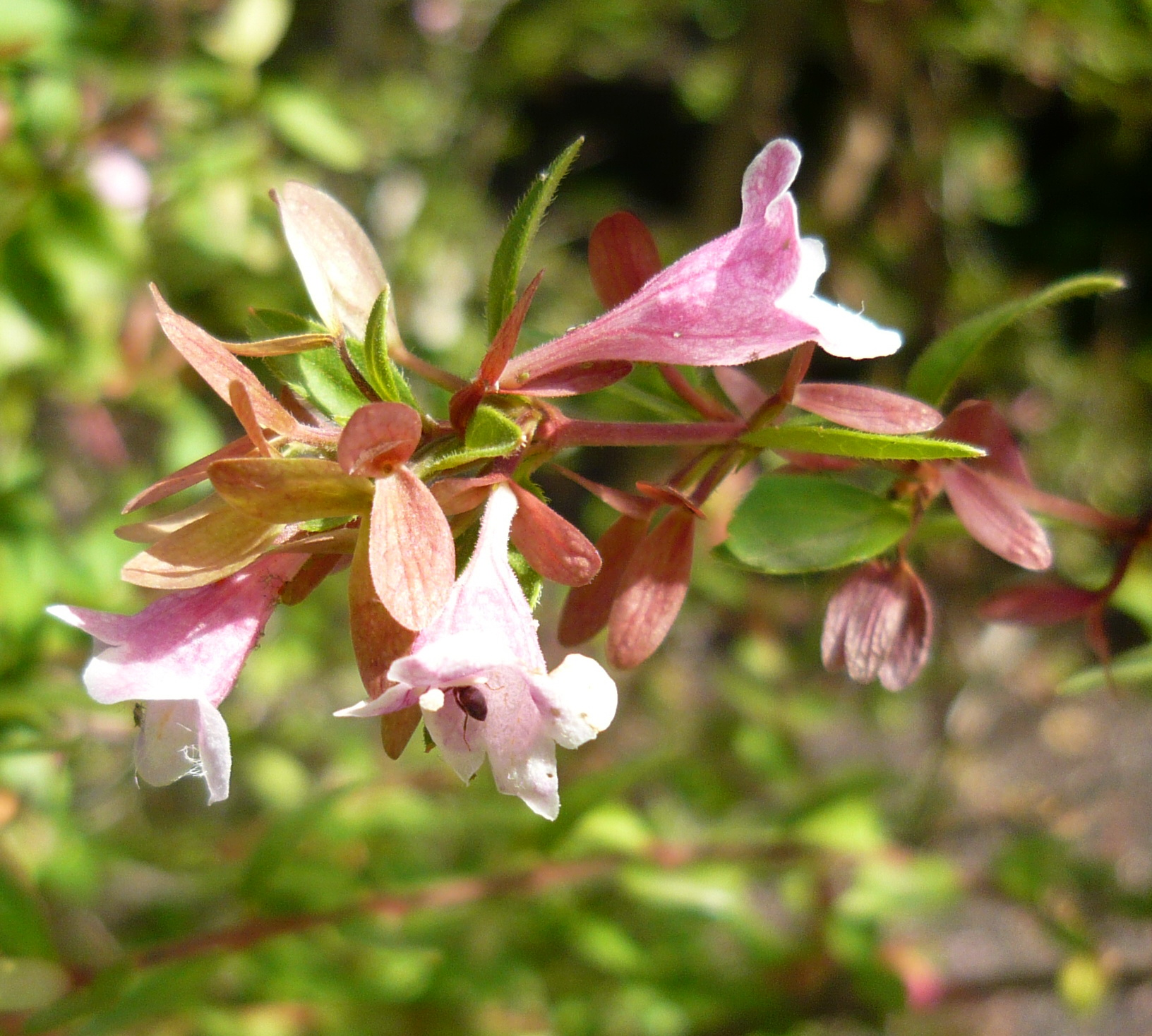 Abelia schumannii. Real Jardín Botánico, Madrid, España.